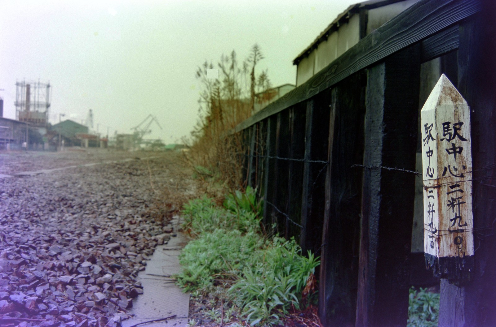 廃止後の日本国有鉄道桜島線貨物支線・大阪北港駅構内。